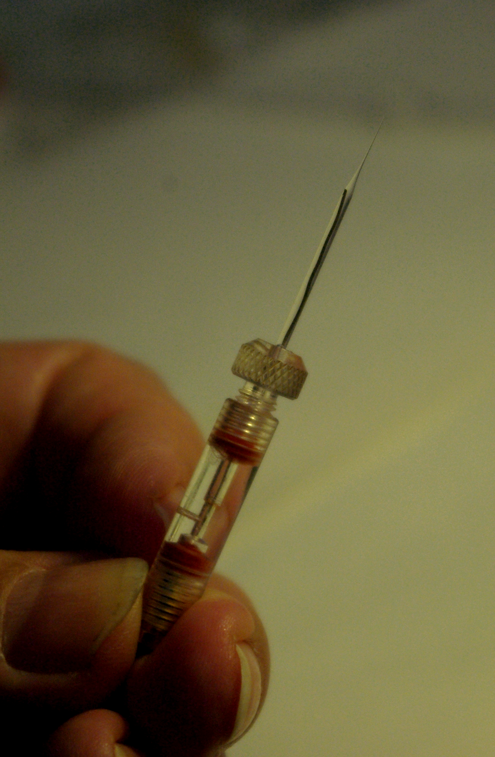 Стеклянный микроэлектрод в держателе